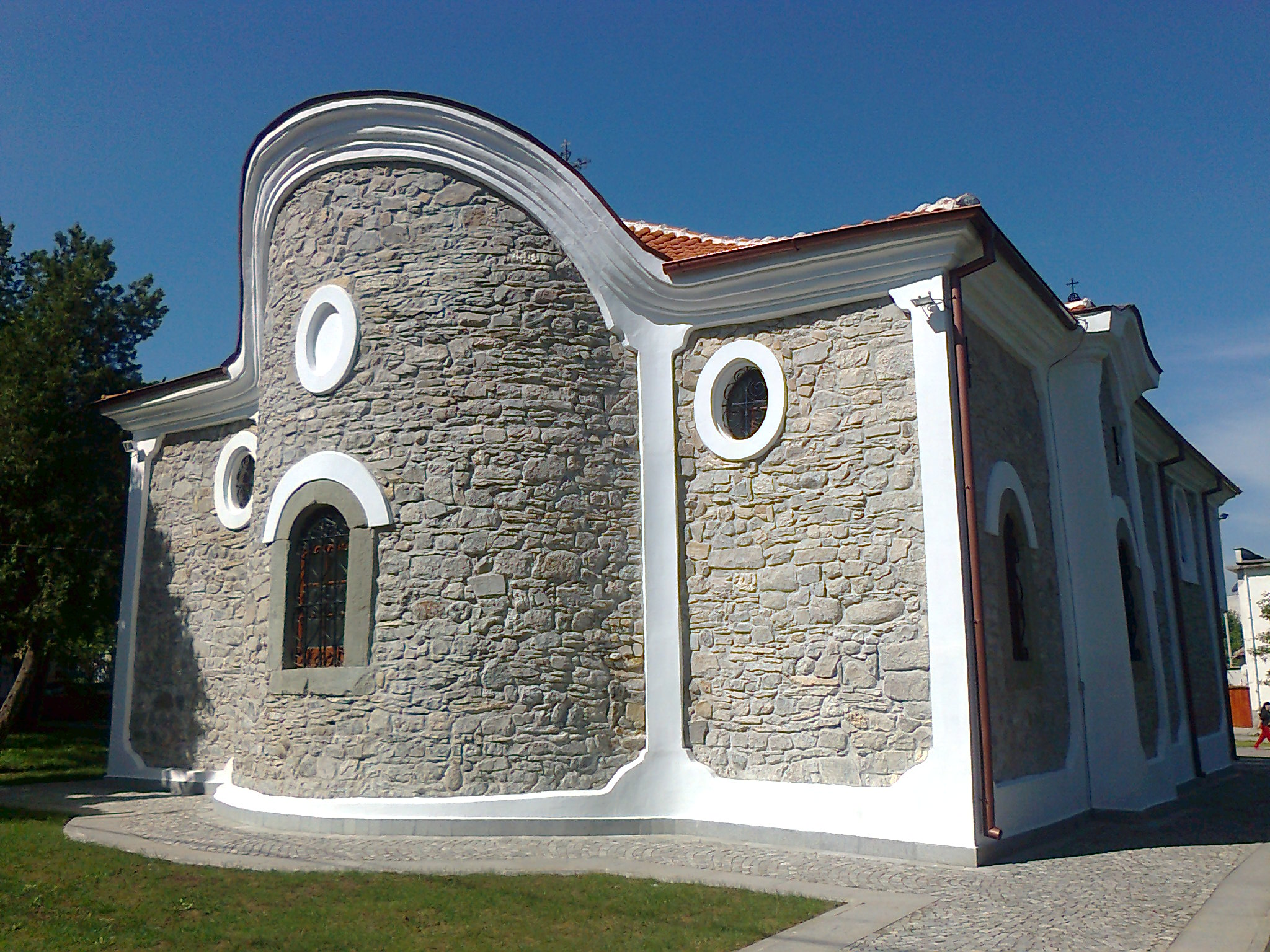 Църквата "Св. Димитър Солунски", Елхово. Изглед откъм апсидата.